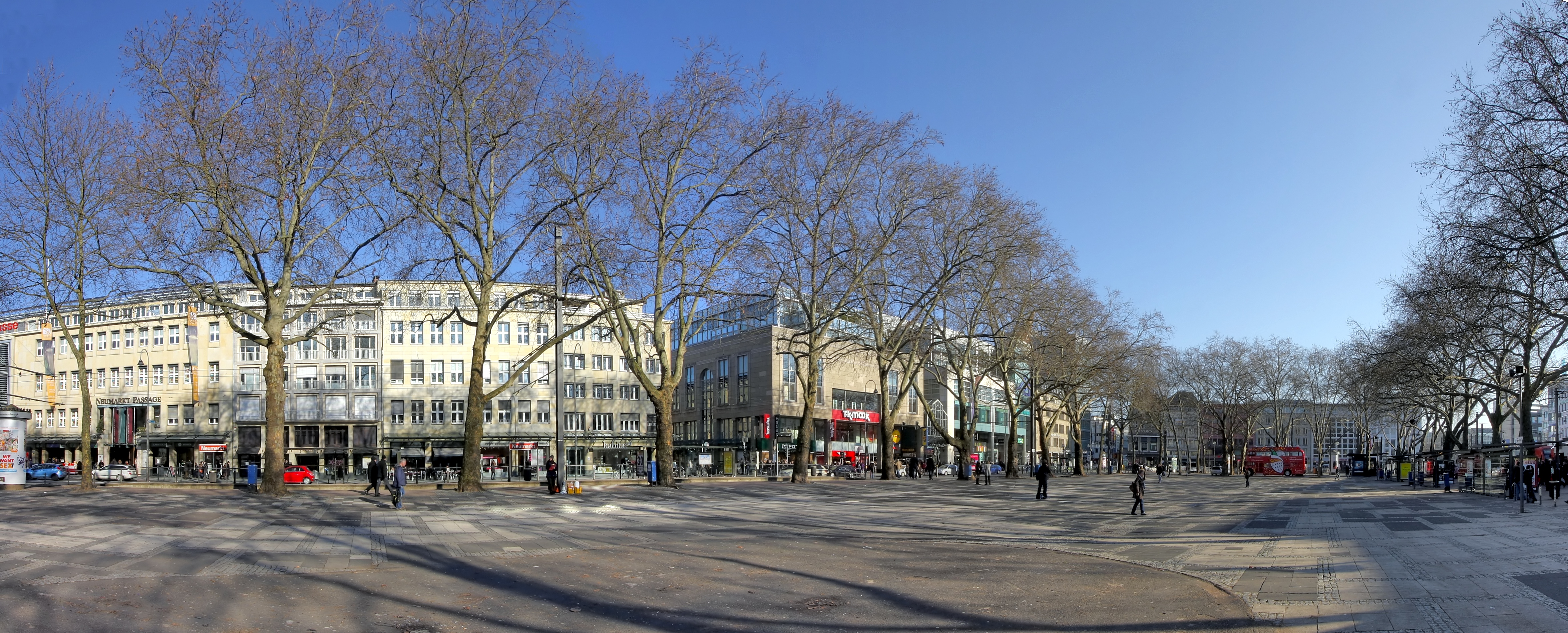 Neumarkt im Winter, Köln. Blickrichtung Nordosten.